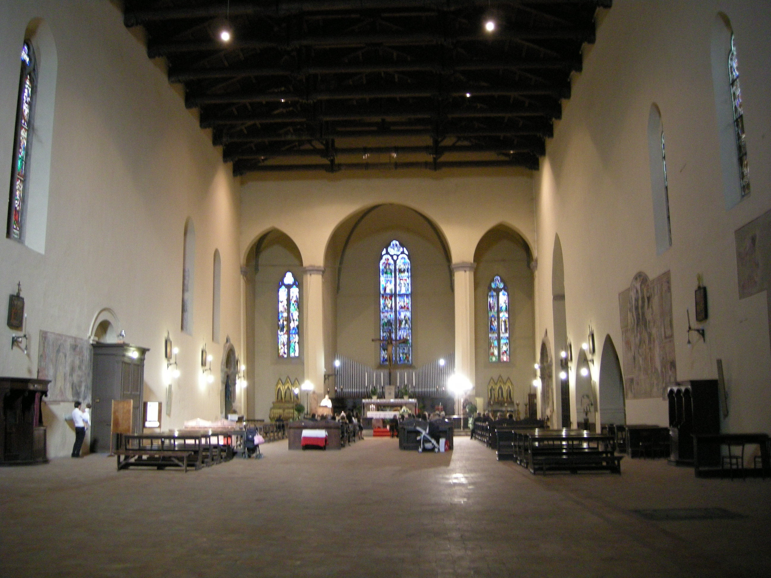 Città di castello, san domenico, interno